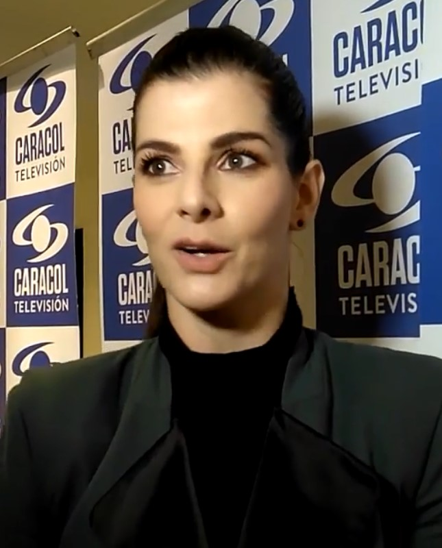 El pasado miércoles 06 de diciembre, medios de comunicación de la capital, vivieron las novedades en entretenimiento, dramatizados, opinión y deportes que Caracol Televisión trae para el 2018 y lo que resta del 2017.